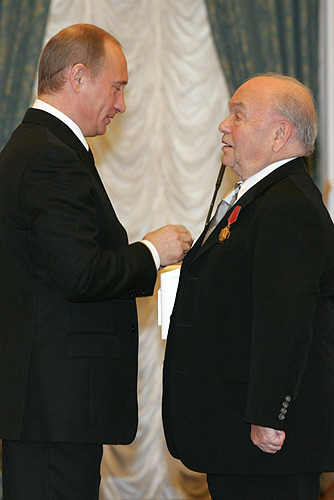 Москва, Кремль, Екатерининский зал. Президент Российской Федерации Владимир Путин вручает композитору Владимиру Шаинскому орден «За заслуги перед Отечеством» IV степени